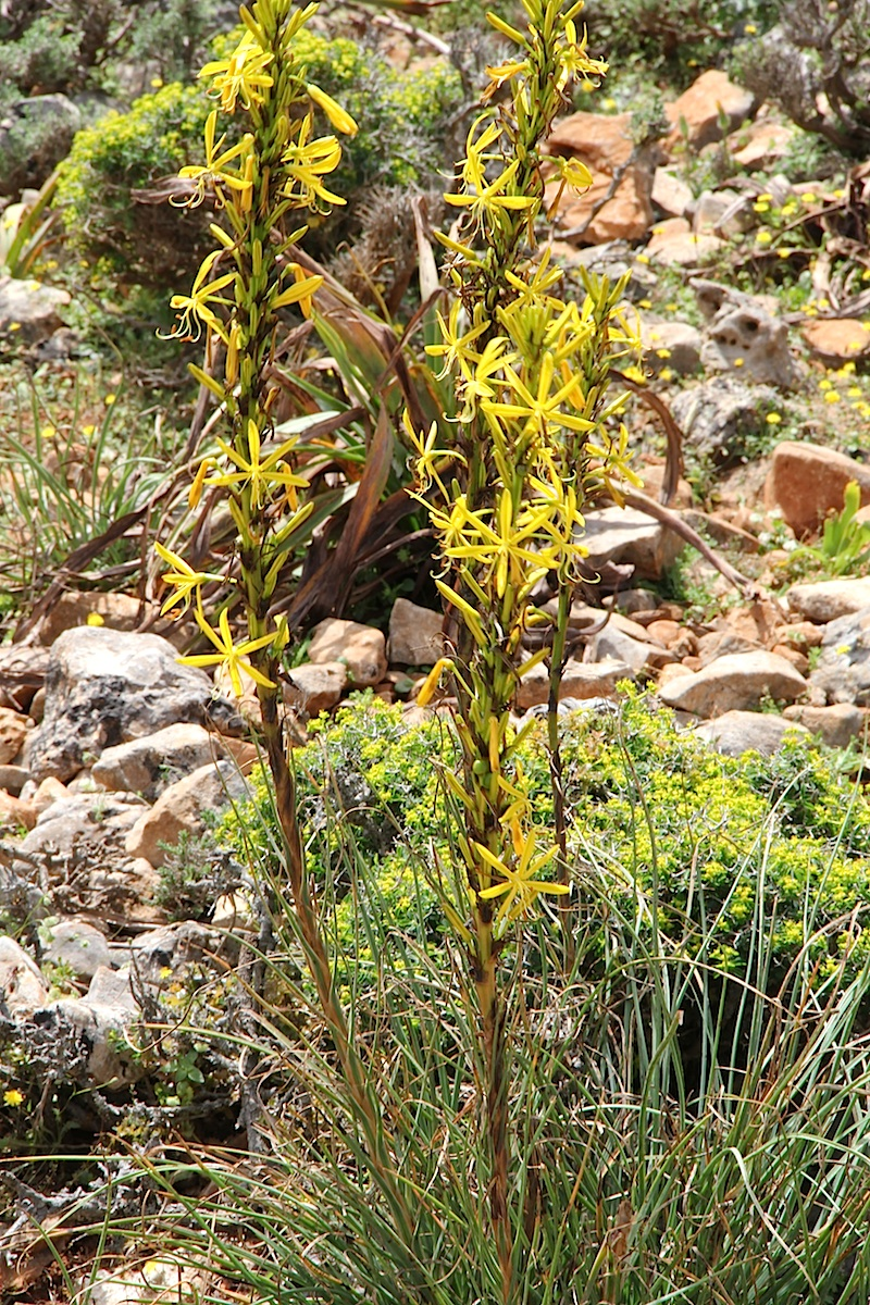 Asphodeline lutea